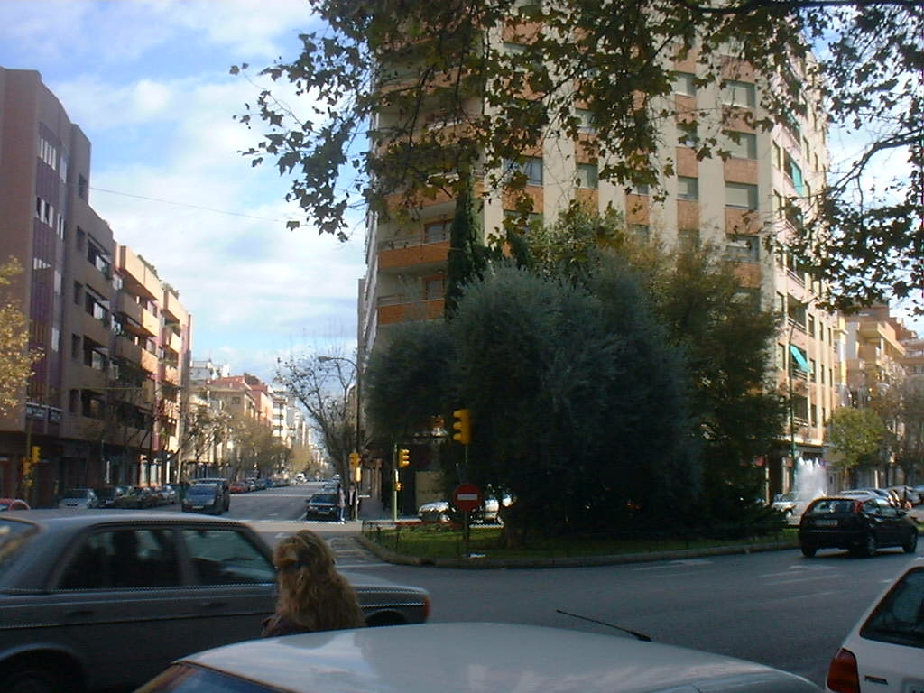 Plaza de Abú Yahya